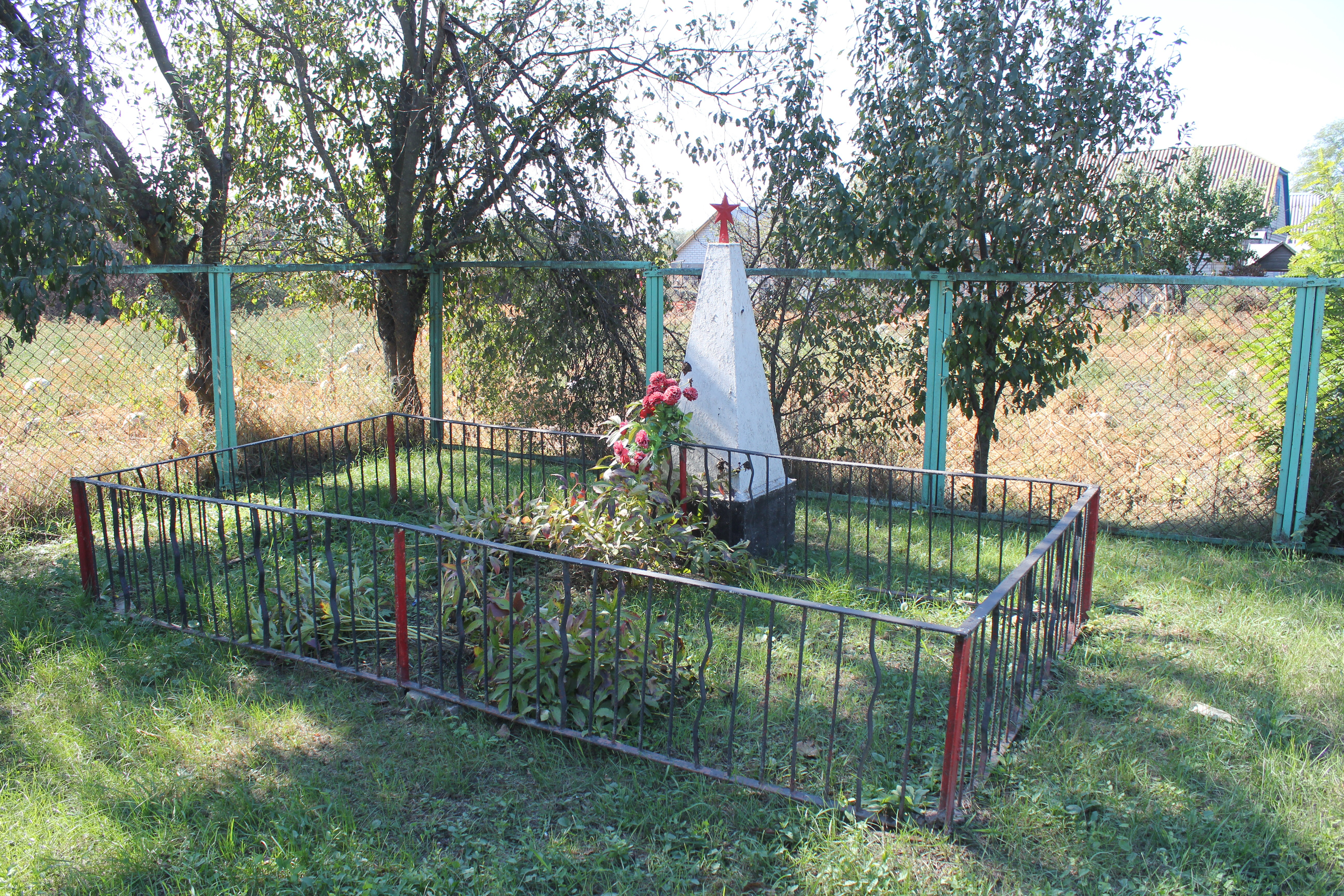 Братська могила воїнів Радянської Армії, які померли в шпиталі від ран у вересні-грудні 1943 року, село Улянівка, при в'їзді в село